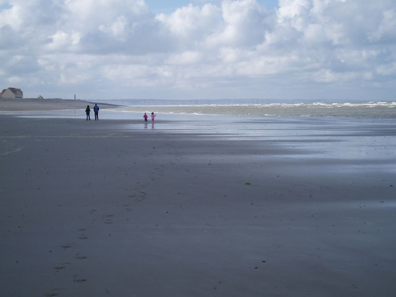 Cayeux-sur-Mer (Somme, France) La plage.